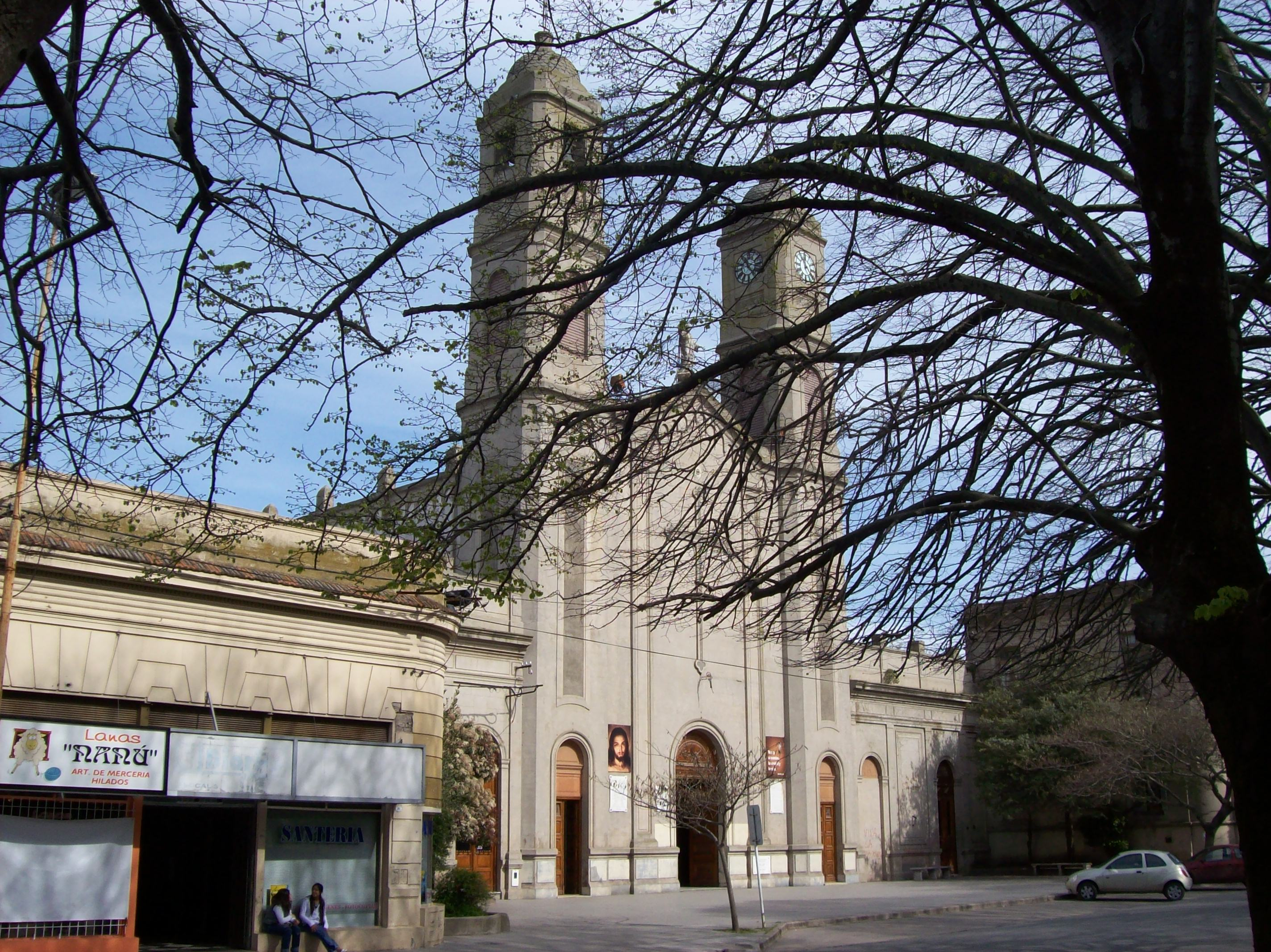 Iglesia parroquial San José en la ciudad de Balcarce, Provincia de Buenos Aires, Argentina.